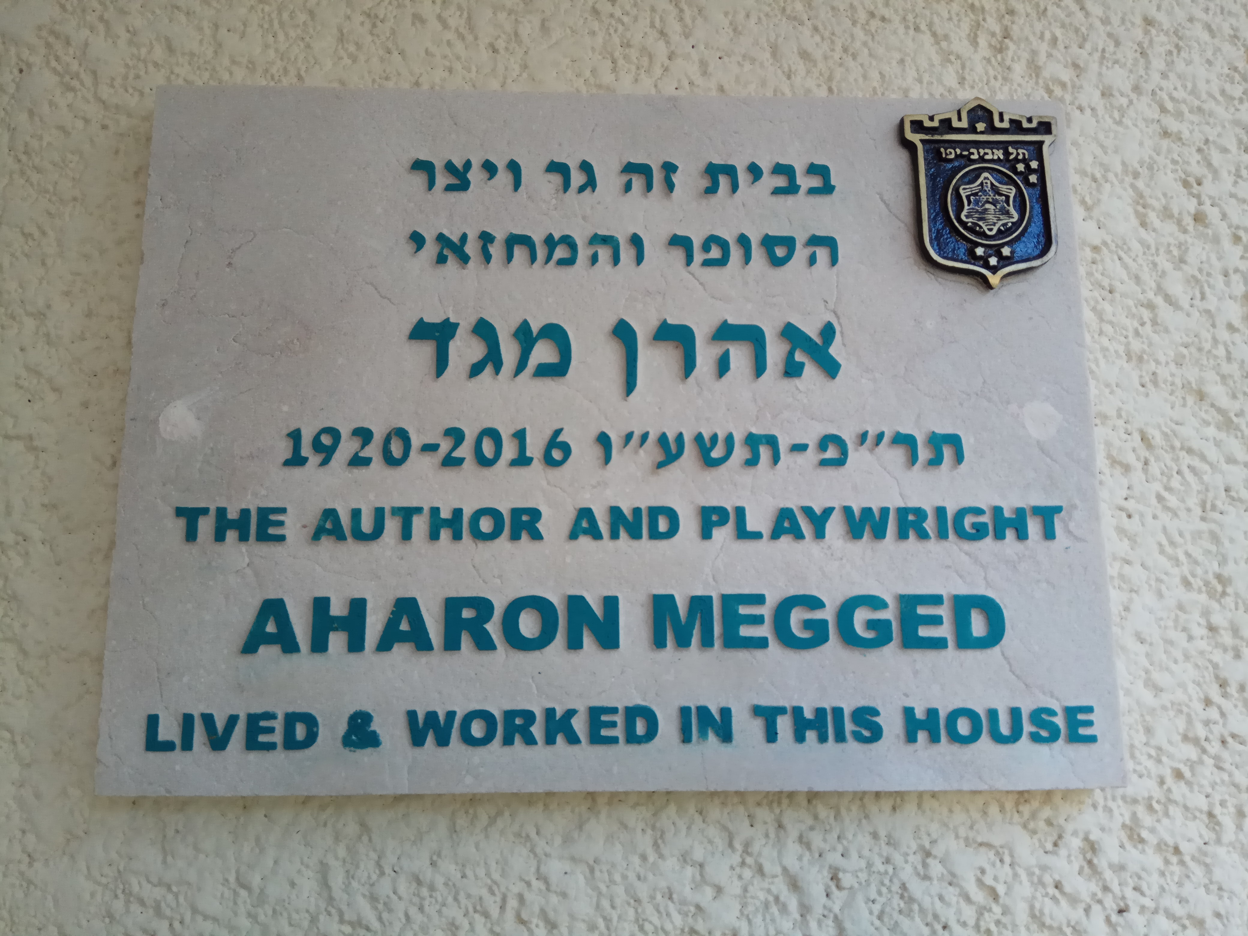 לוחית זיכרון לאהרון מגד ברחוב רופין 26 בתל אביב